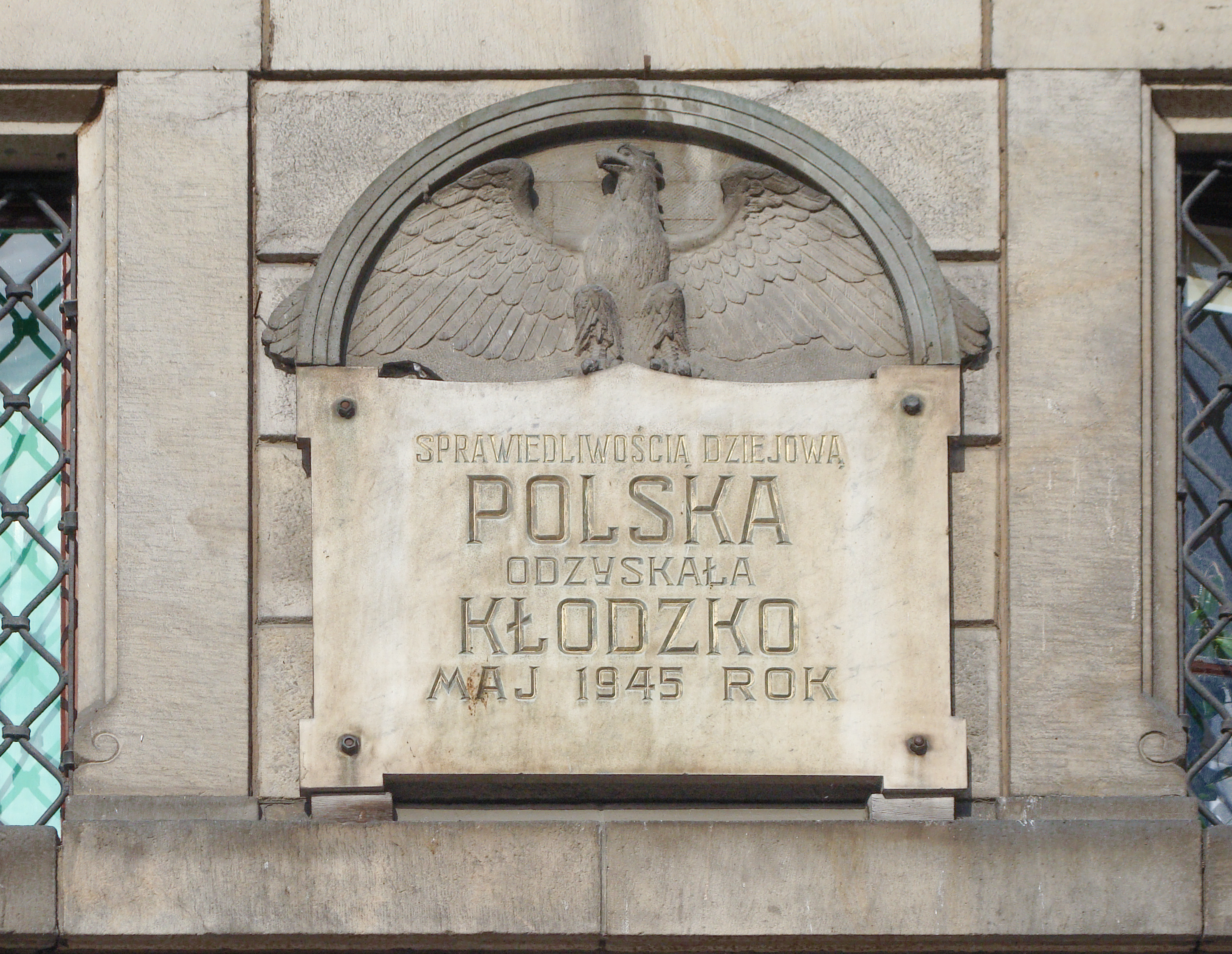 Tablica upamiętniająca odzyskanie przez Polskę w 1945 r. Kłodzka będącego jednym z miast Ziem Odzyskanych